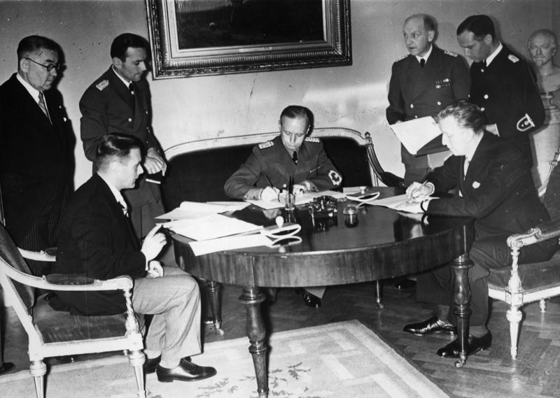 Unterzeichnung der Nichtangriffs-Verträge zwischen Deutschland, Lettland und Estland im Auswärtigen Amt [in Berlin] Heute mittag fand im Auswärtigen Amt die Unterzeichnung der Nichtangriffs-Verträge zwischen Deutschland, Lettland und Estland statt. U.B.z. von links nach rechts: Aussenminister Munters (Lettland), Reichsaussenminister von Ribbentrop und Aussenminister Selter (Estland) bei der Unterzeichnung der Verträge. Fot. Mü[ller] , 7.6.39 Scherl Bilderdienst Berlin